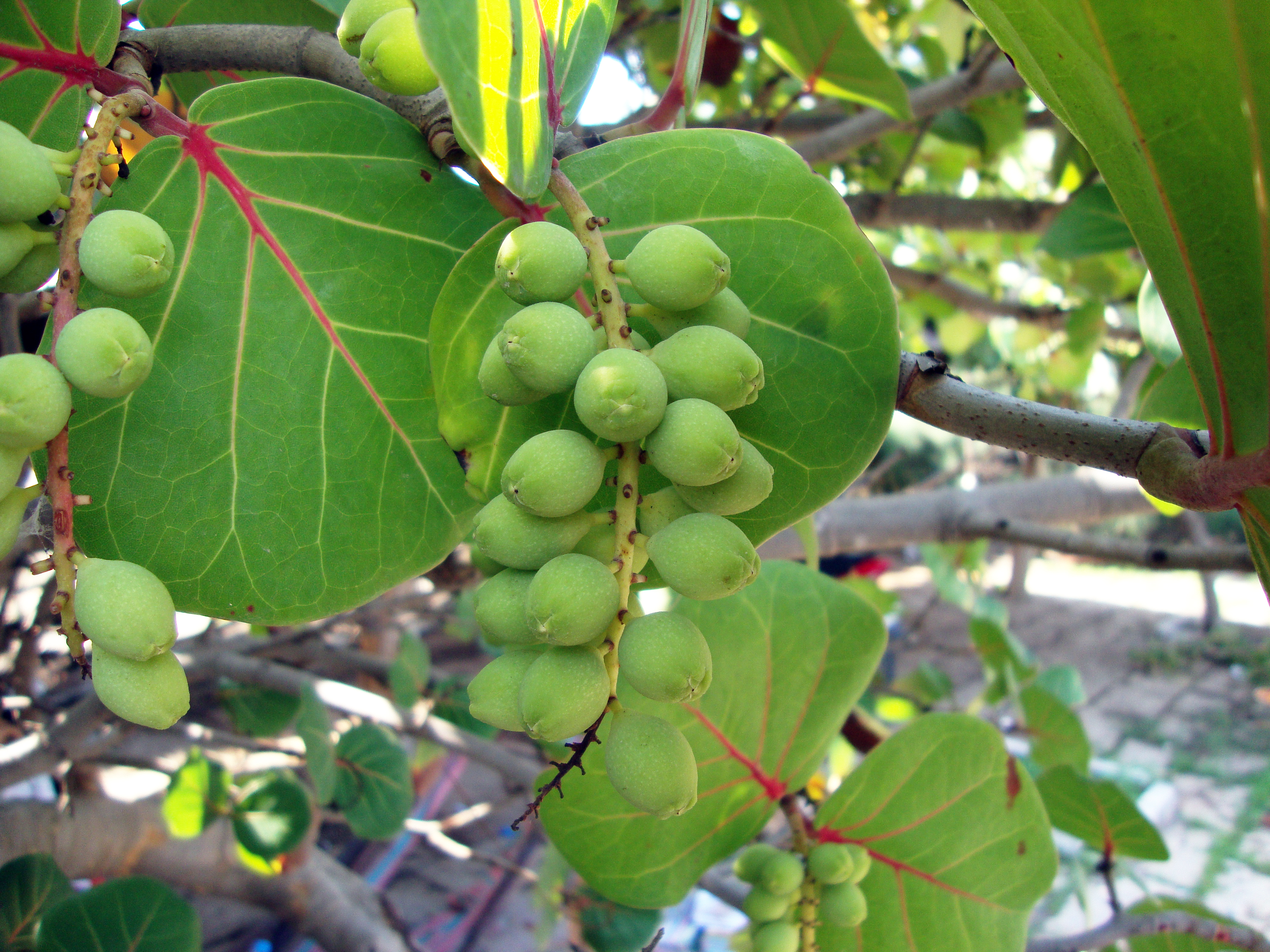 Coccoloba uvifera (L.) L., 1759